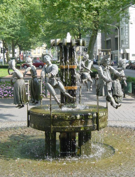 Bildbeschreibung: Puppenbrunnen, Südwall, Krefeld Quelle: selbst fotografiert Fotograf/Zeichner: User:DER UNFASSBARE